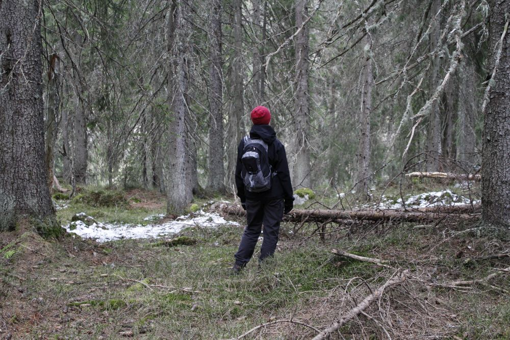 Gammel granskog i Presteseter naturreservat.